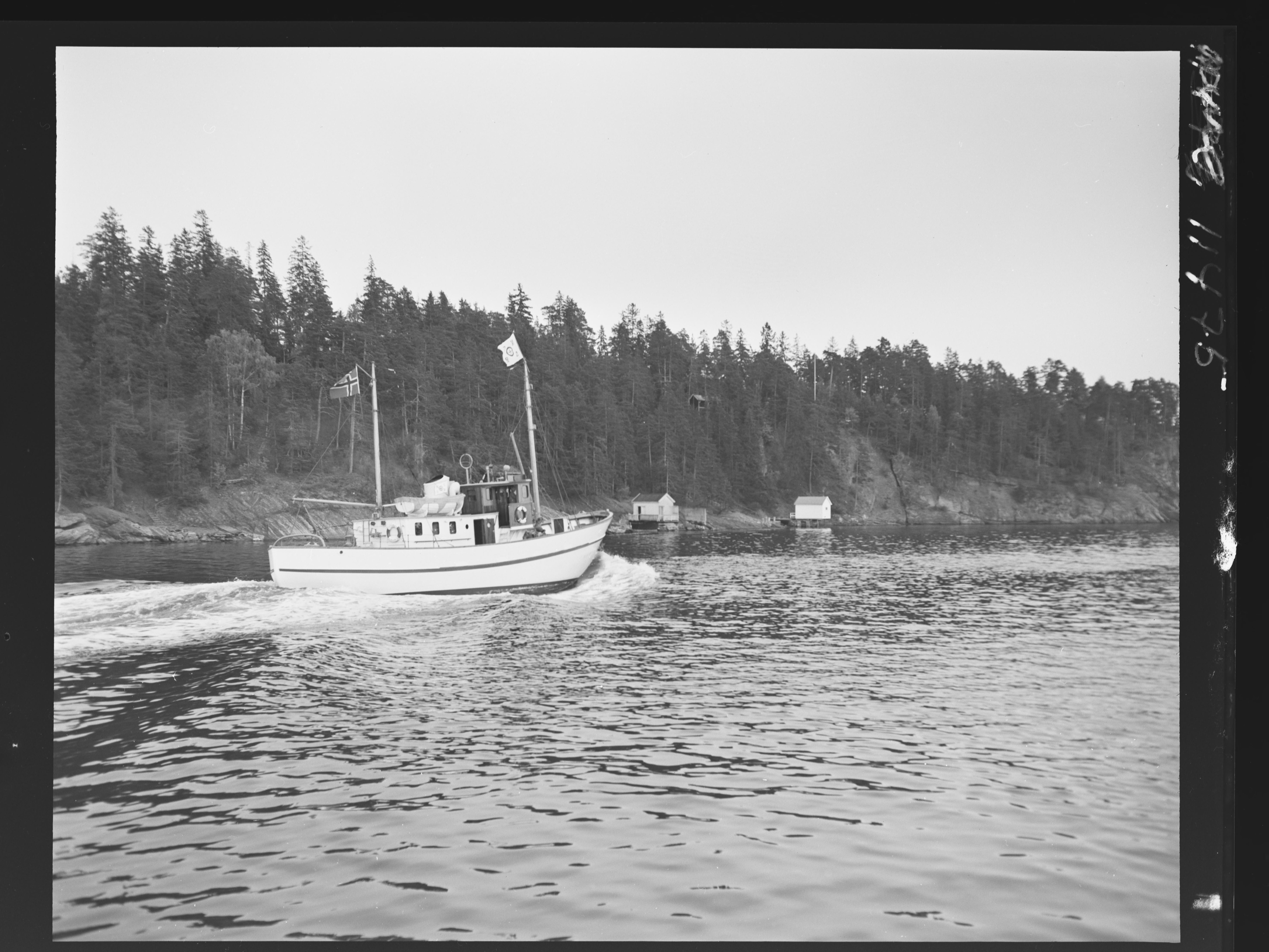 Bildet er hentet fra Nasjonalbibliotekets bildesamling. Anmerkninger til bildet var: fotograf ukjent